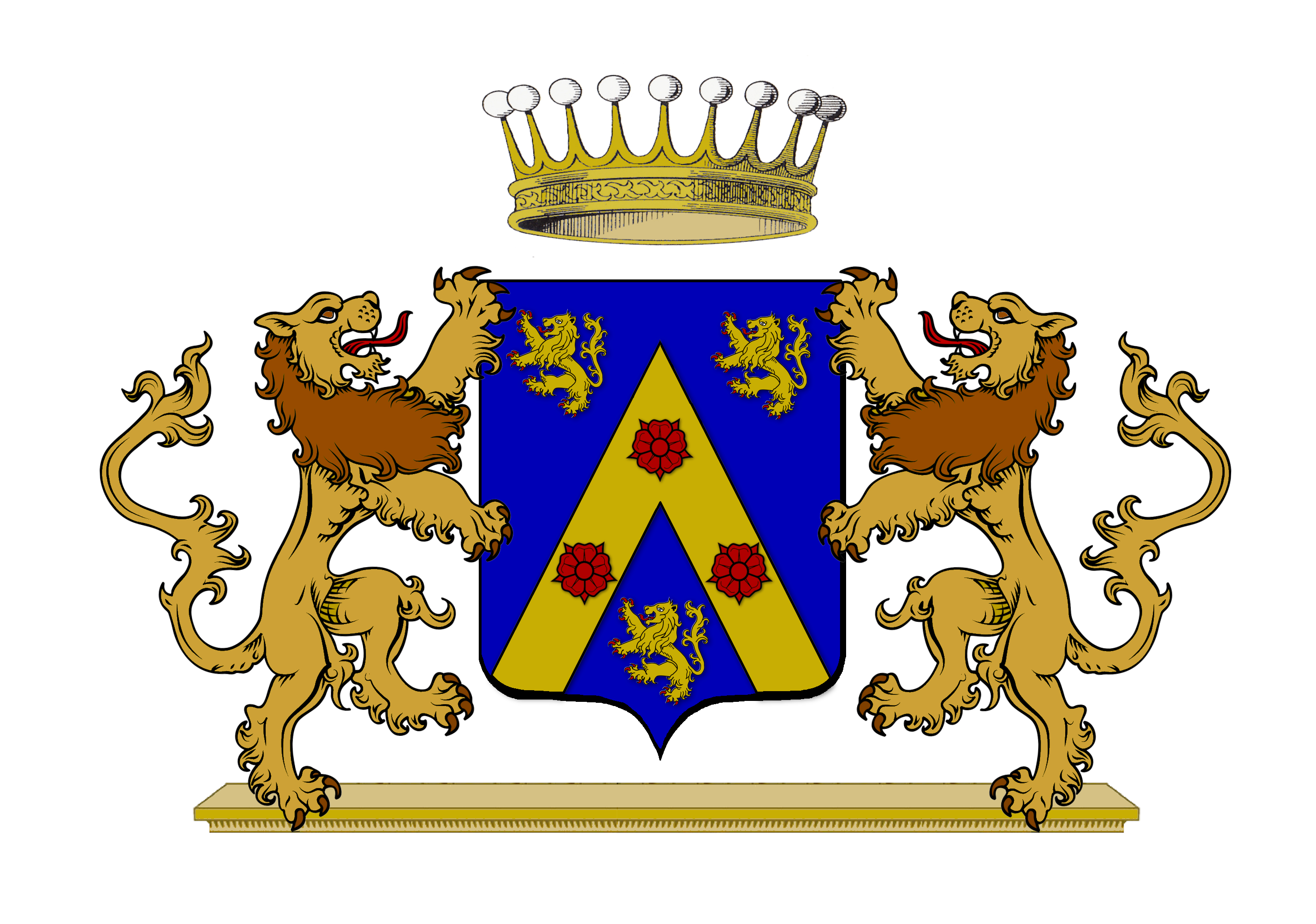 D'azur, au chevron d'or chargé de trois roses de gueules, accompagné de trois lions grimpants d'or, deux en chef, un en pointe. Deux lions en supports.